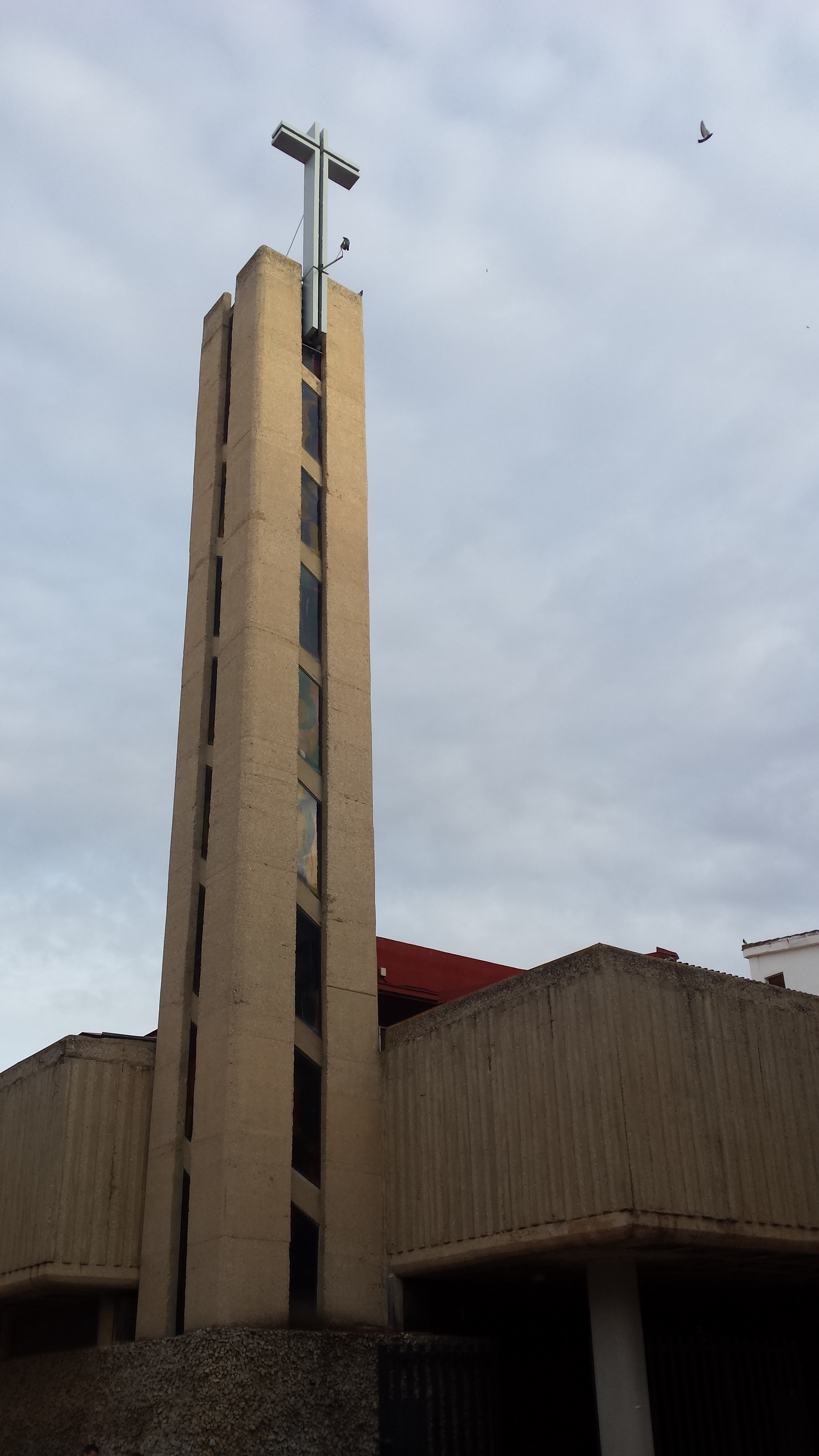 Vista de la Iglesia de la Asunción de Albacete.